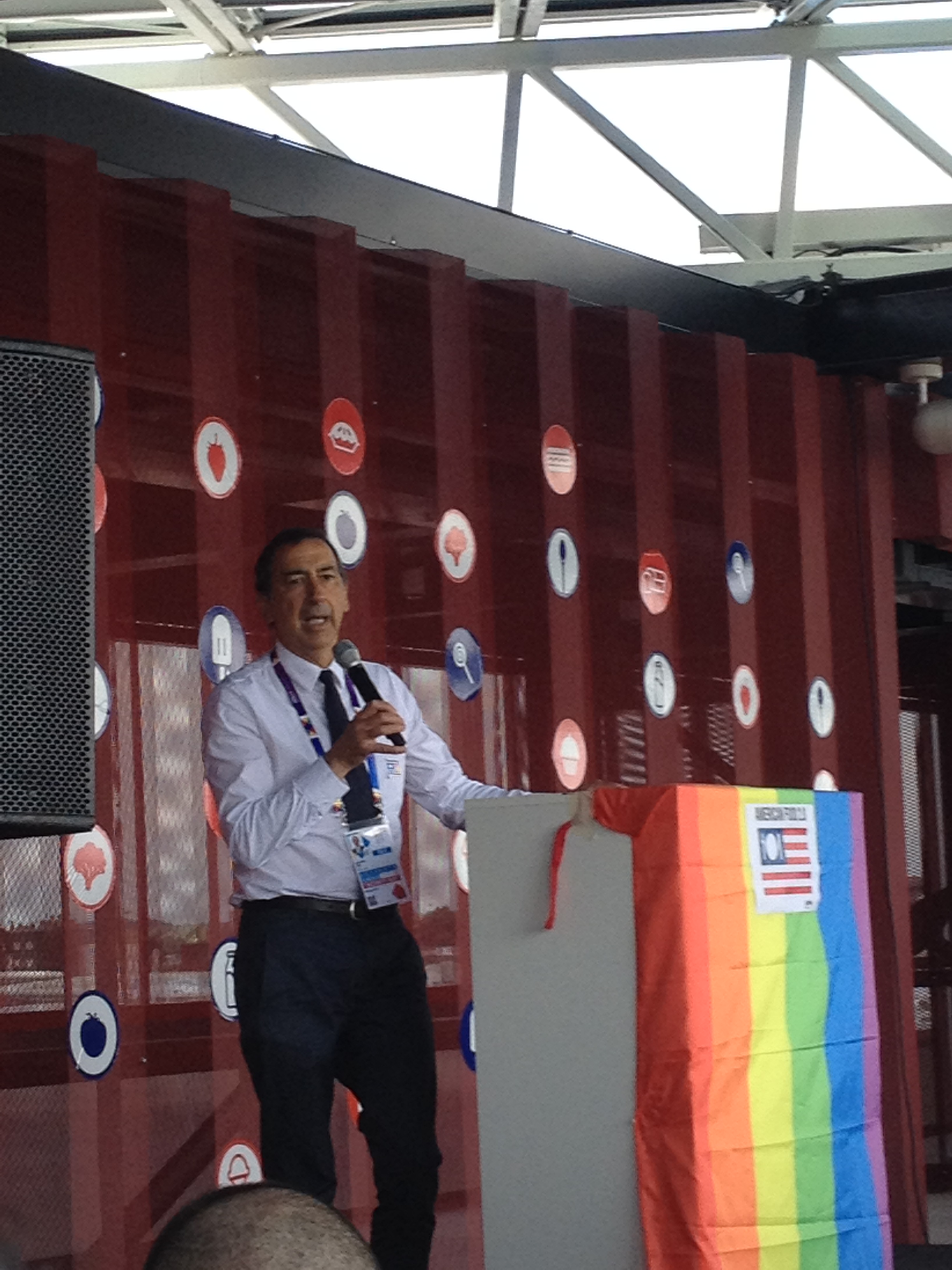 Giuseppe Sala, Commissario Expo 2015, al Padiglione USA ad una manifestazione del Pride 2015